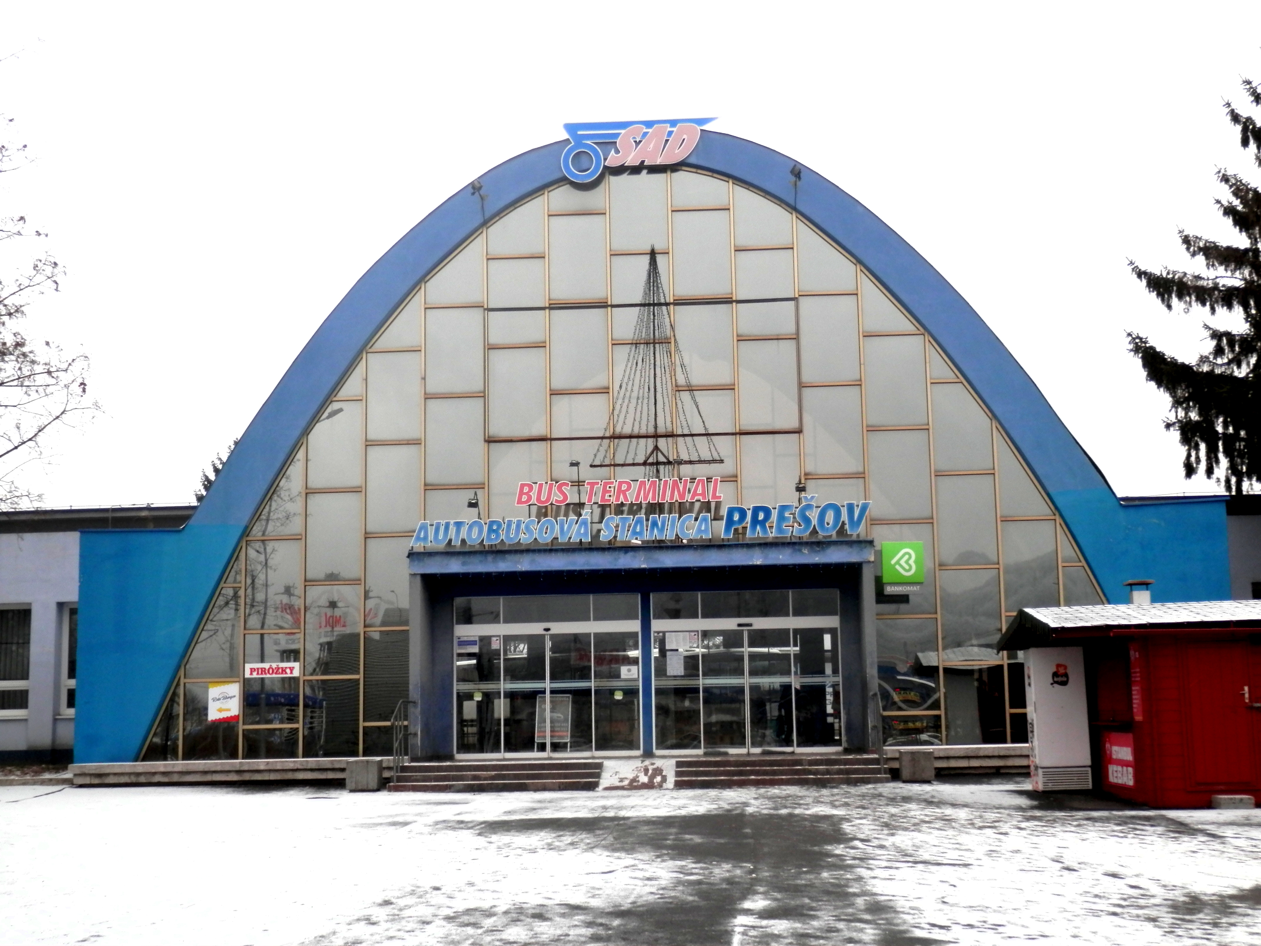 4.1.2020. Vstupná hala. Autobusová stanica SAD Prešov. Mesto Prešov. Slovensko.